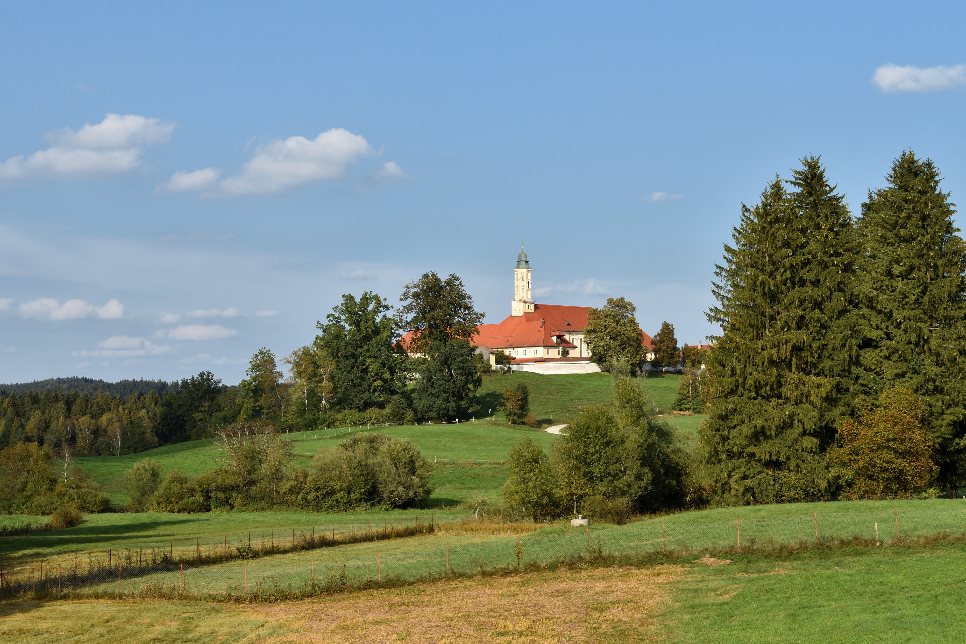 LK Bad Tölz-Wolfratshausen - Kloster Reutberg - September 2018This is a photograph of an architectural monument.